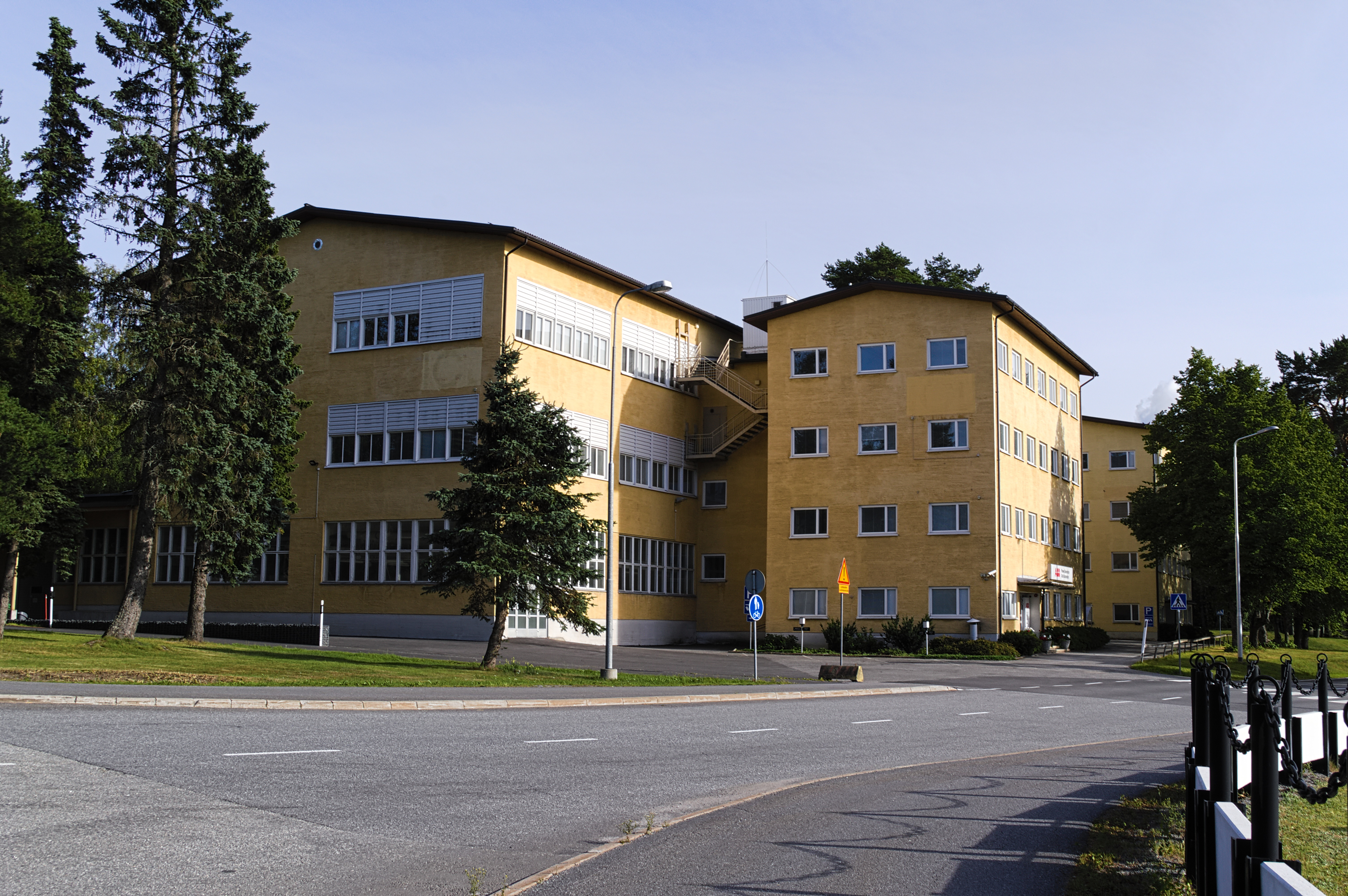 Strömbergin teollisuusalueen (Strömberg Park) moottoritehdas.